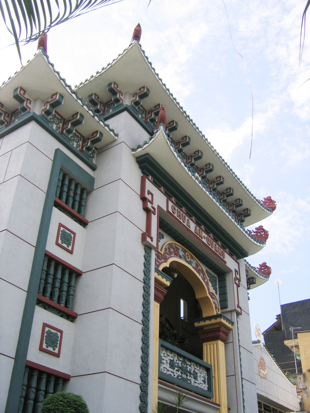 An Quang Pagoda in Ho Chi Minh City, Vietnam.